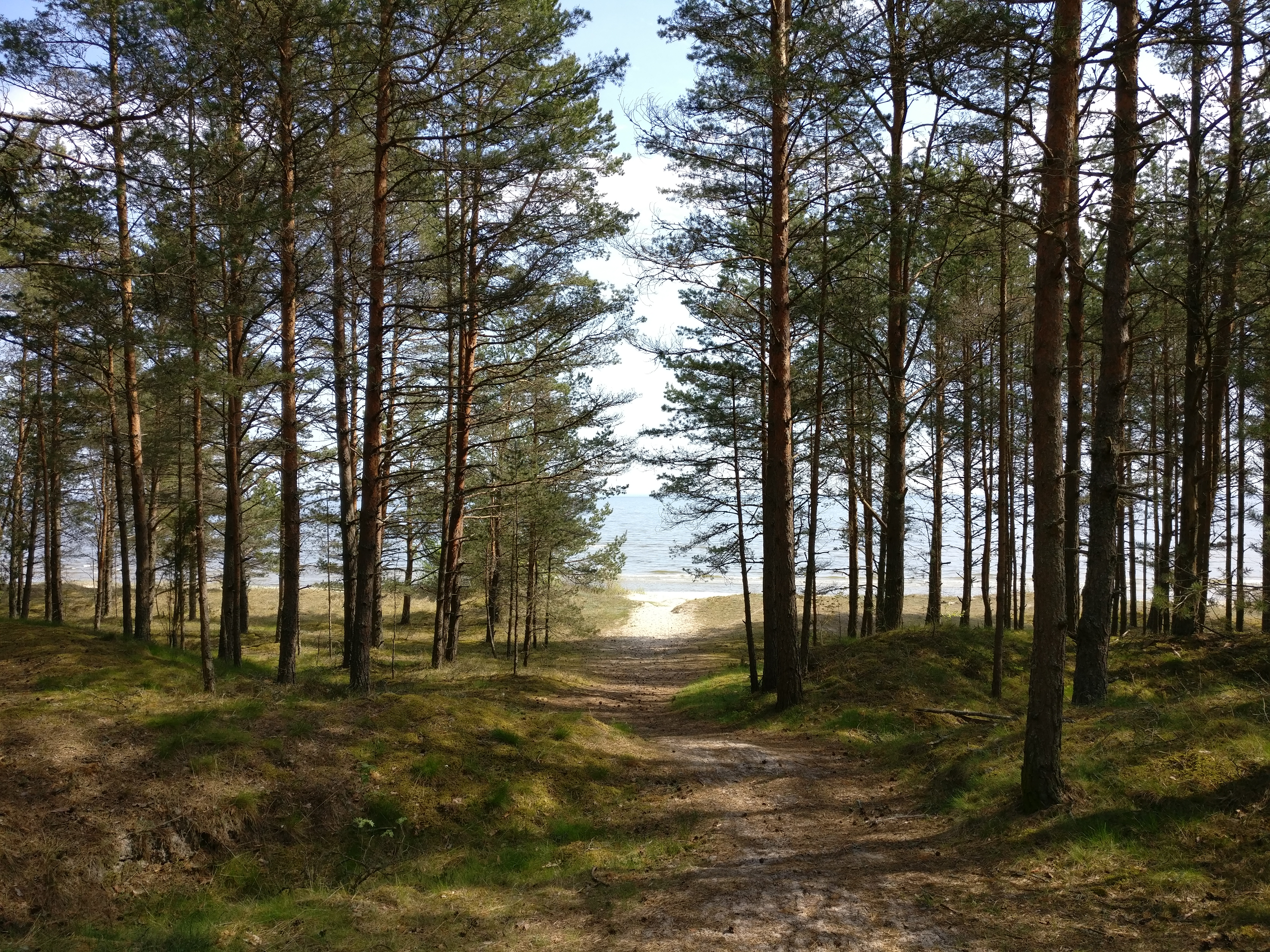 Plieņciema kāpa (dabas liegums)